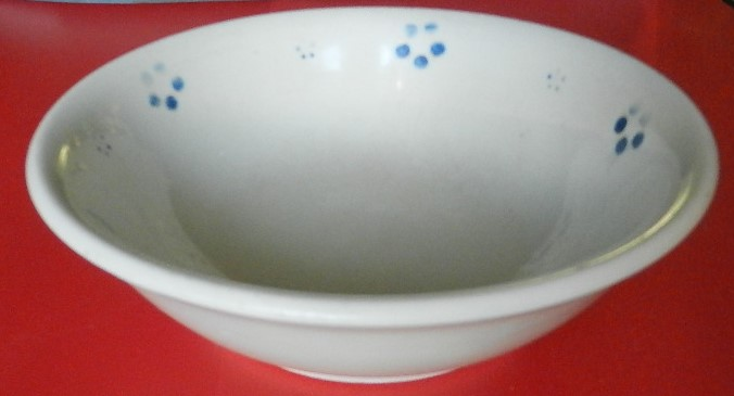 Dickporzellanschale 16 cm, Sorau